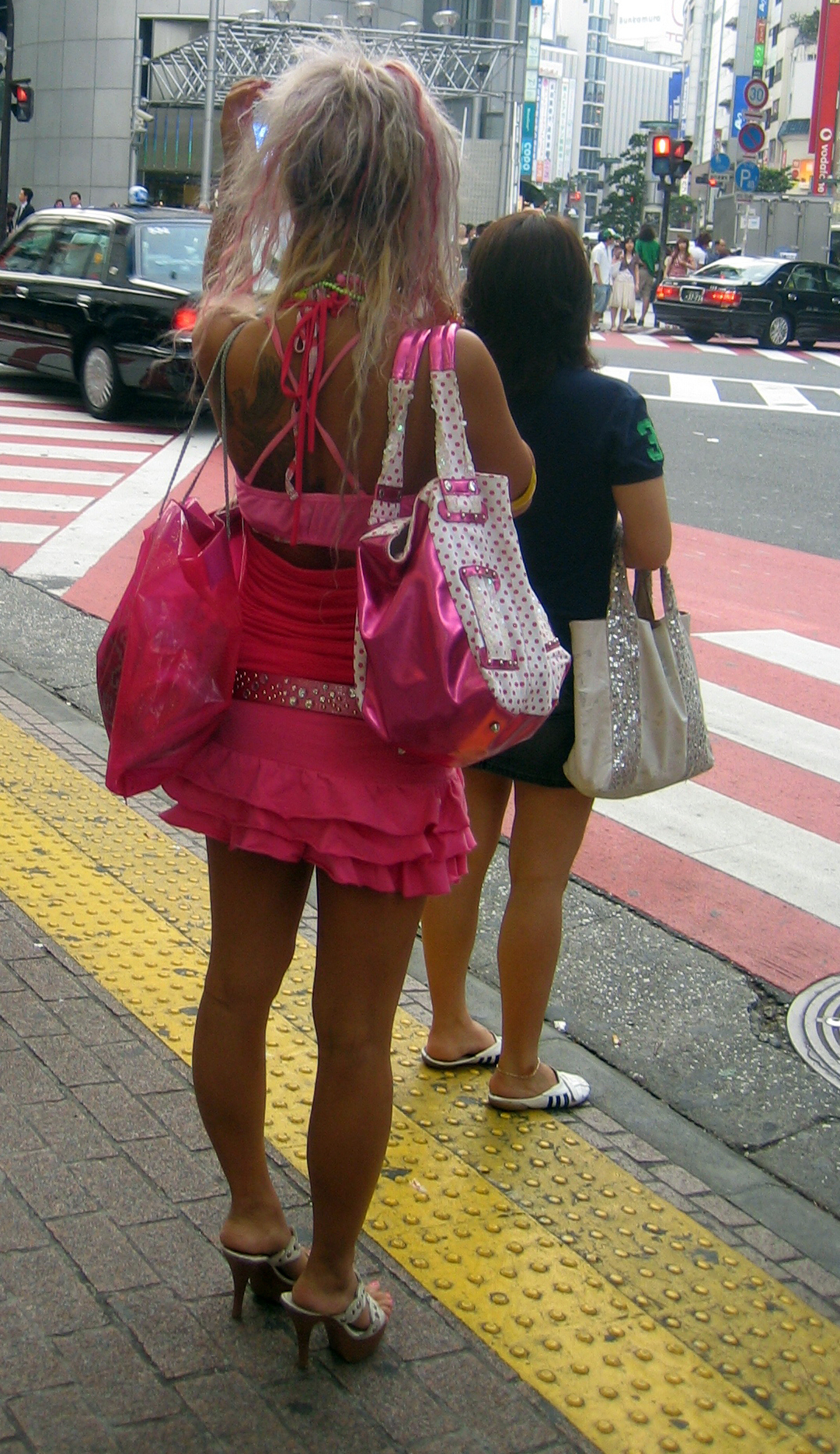 Yamanba de dos (photo contrastée)